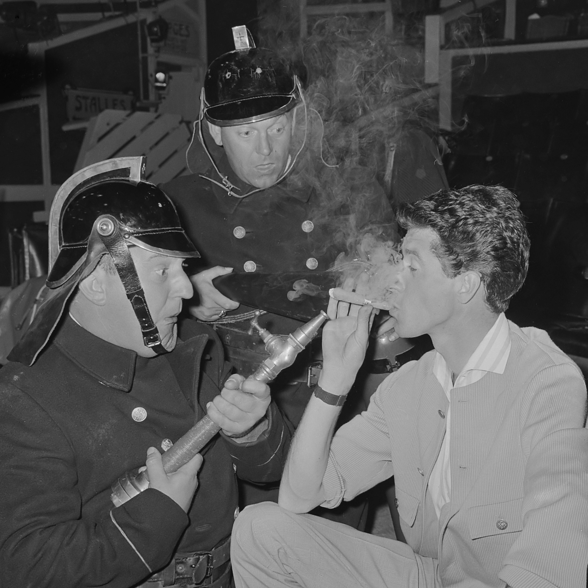 Circus Rudi Carrell, repetitie in Scheveningen; de Mounties (links Piet Bambergen, rechts Fred Plevier) en Rudi Carrell 26 juni 1964